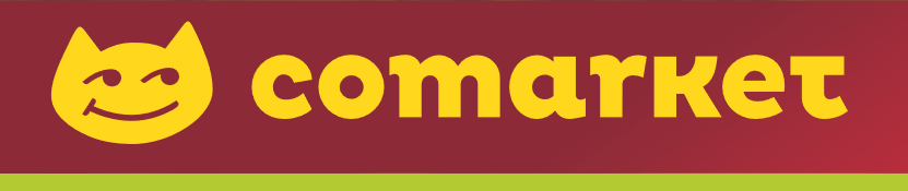 Comarketi logo